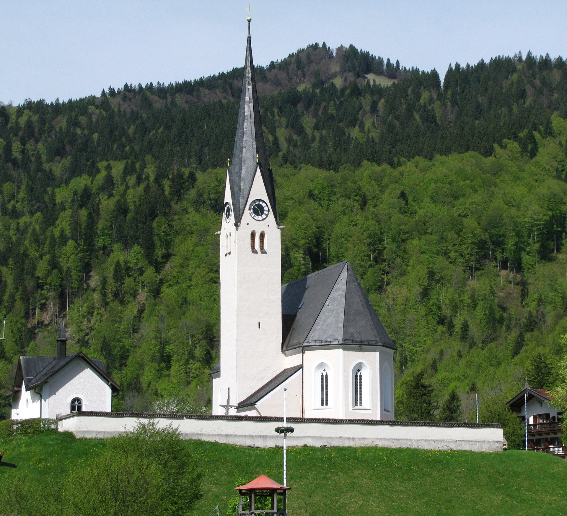 Katholische Pfarrkirche St. Leonhard, spätgotisch, erbaut 1489–1491.